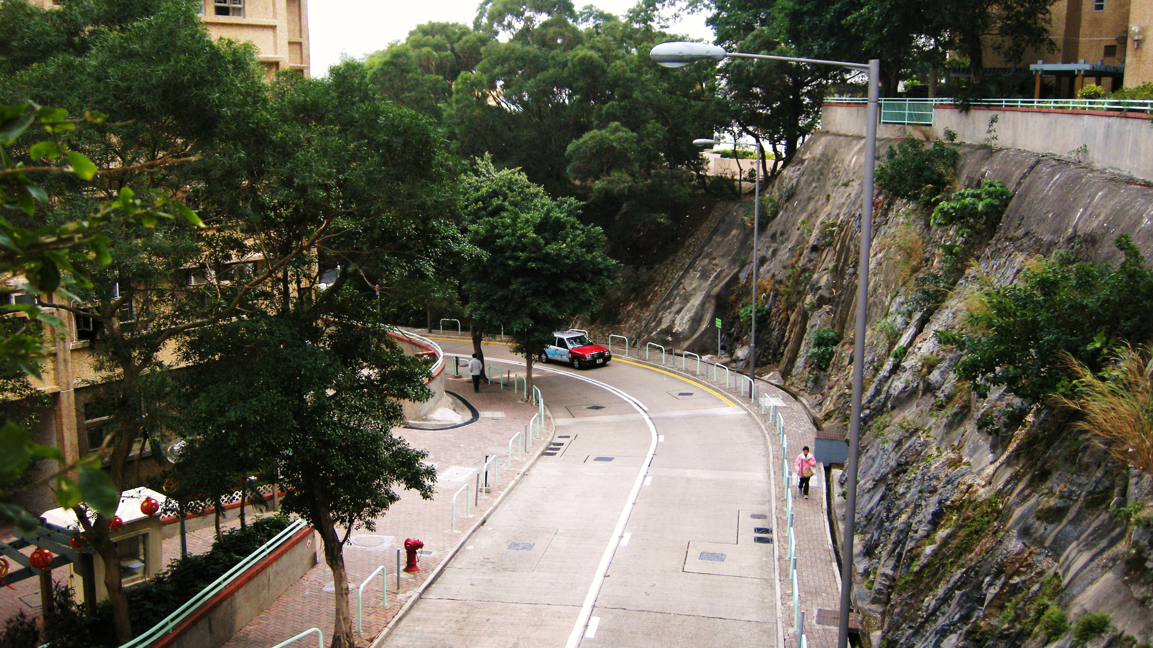 中文（香港）: 漁安苑道(入口段)